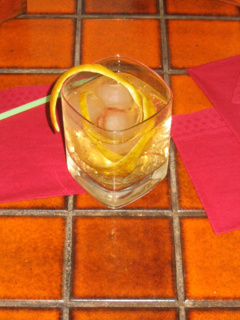 Cocktail